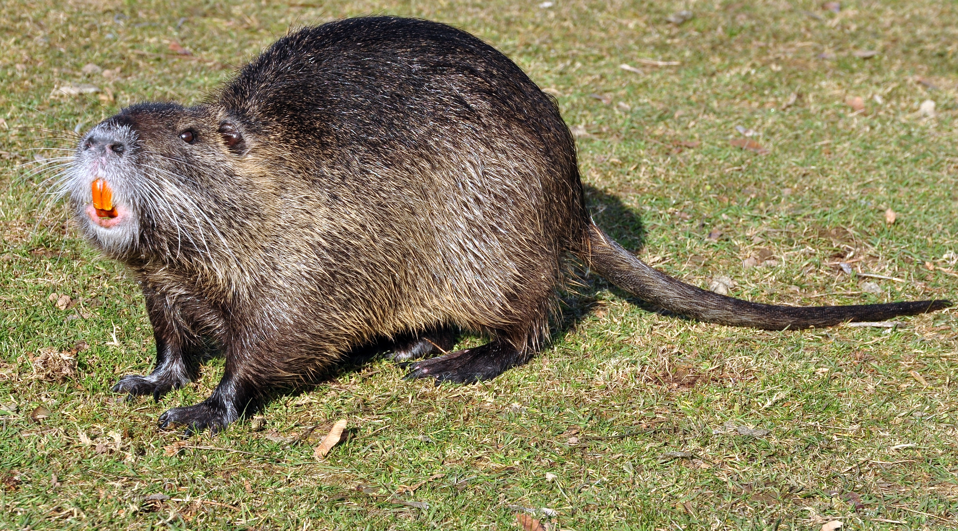 Nutria in der Bonner Rheinaue